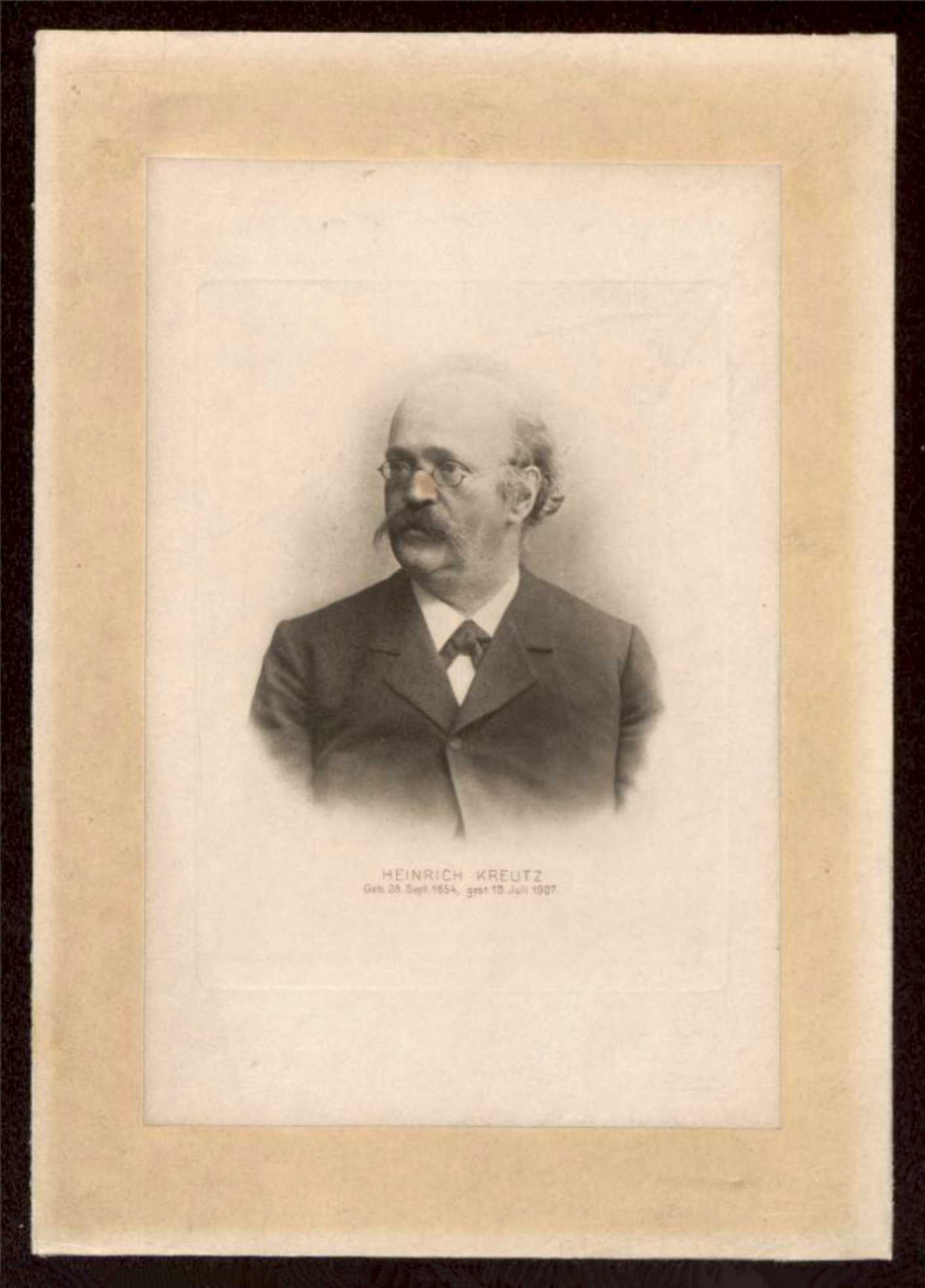 Eliografia dell'astronomo tedesco Heinrich Kreutz